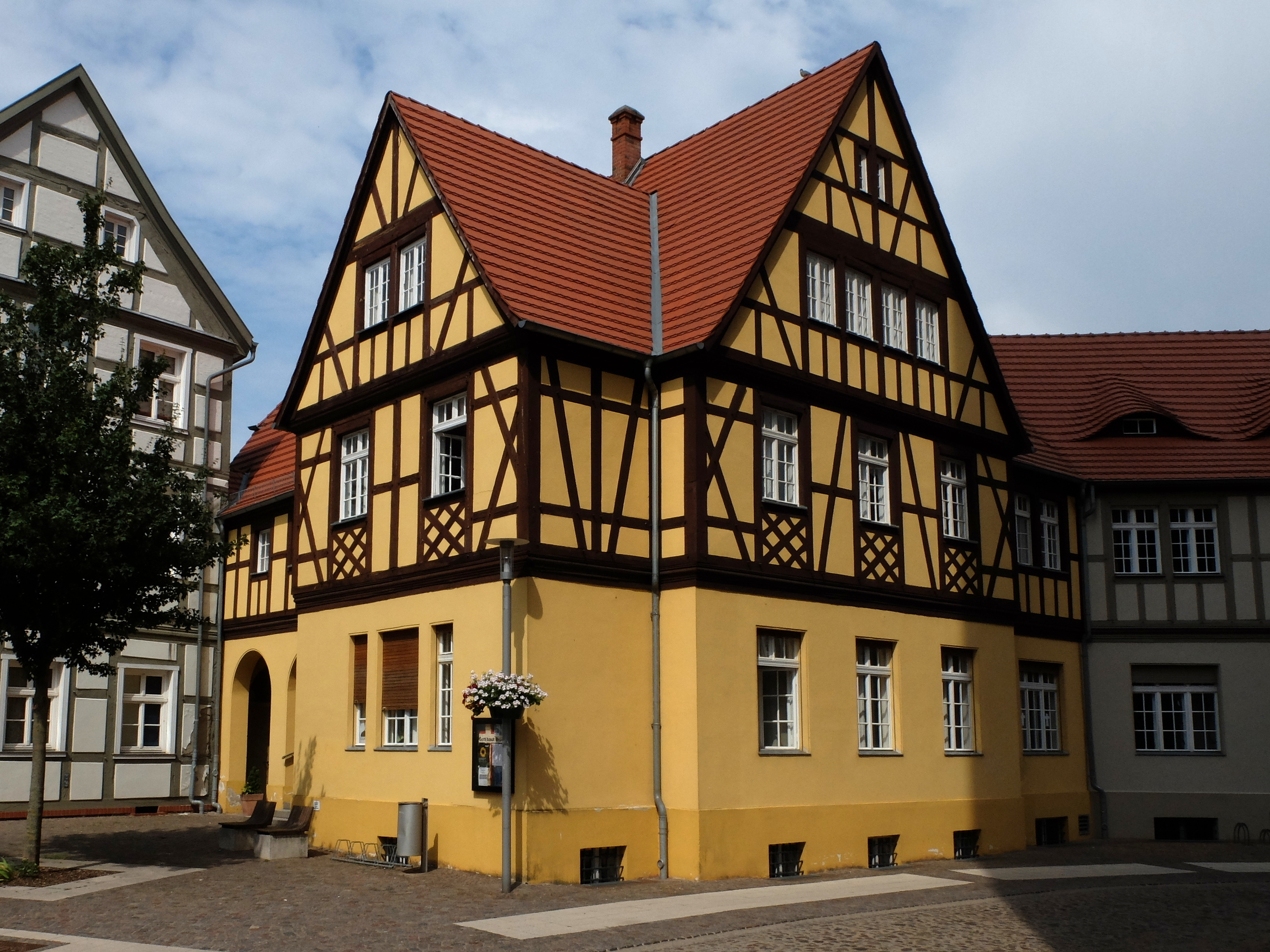 Das Gebäude Kirchplatz 6 in Perleberg, Superintendentur des Kirchenkreises Prignitz. Der Schatten rechts wird durch den Turm der St.-Jakobi-Kirche geworfen.